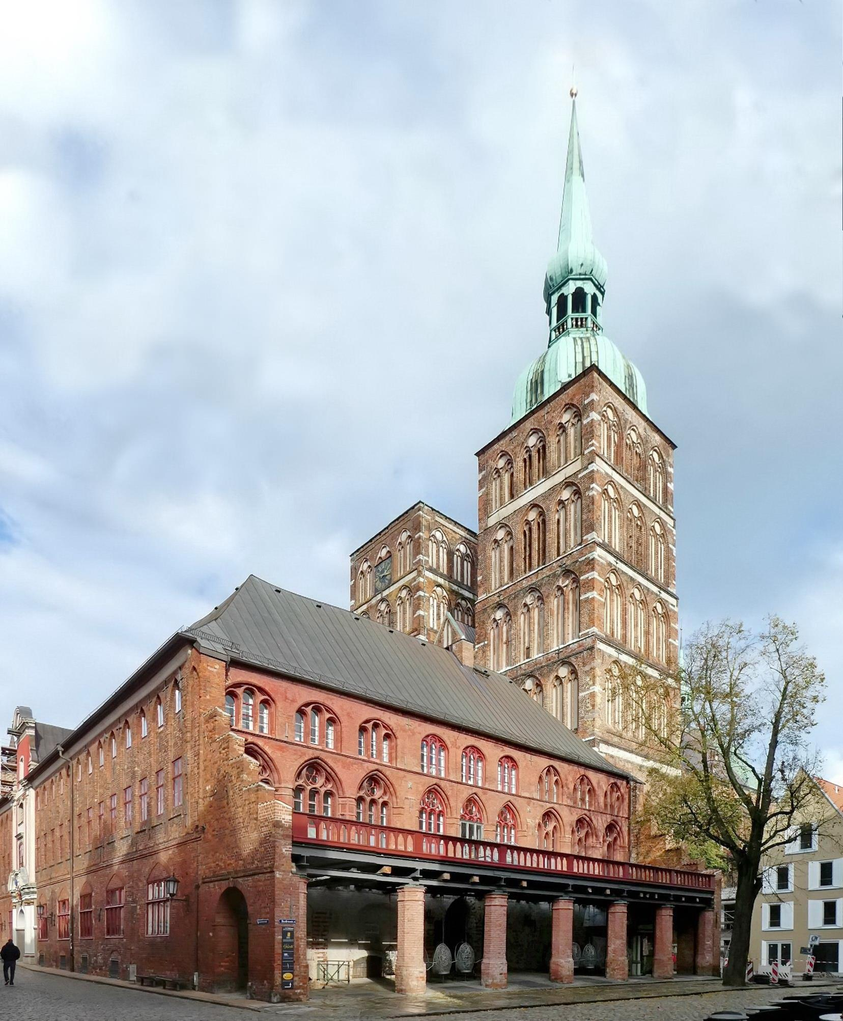 Stralsund Rathausbalkon